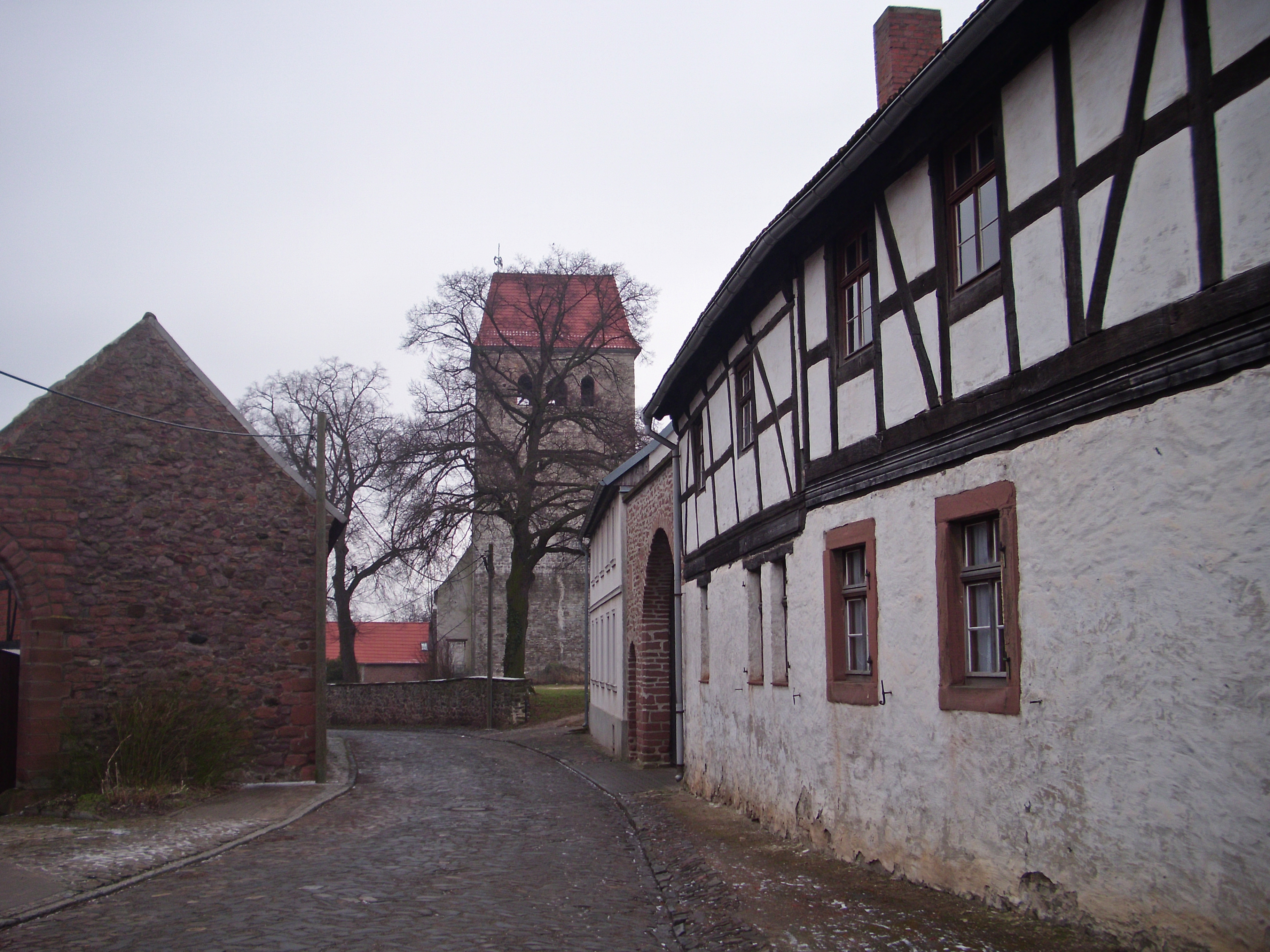 Am Kirchenberg Gutenswegen mit Blick auf die St.Katharinen Kirche